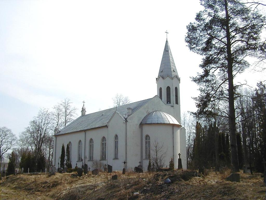 Vanagu baznīca 2001-04-08